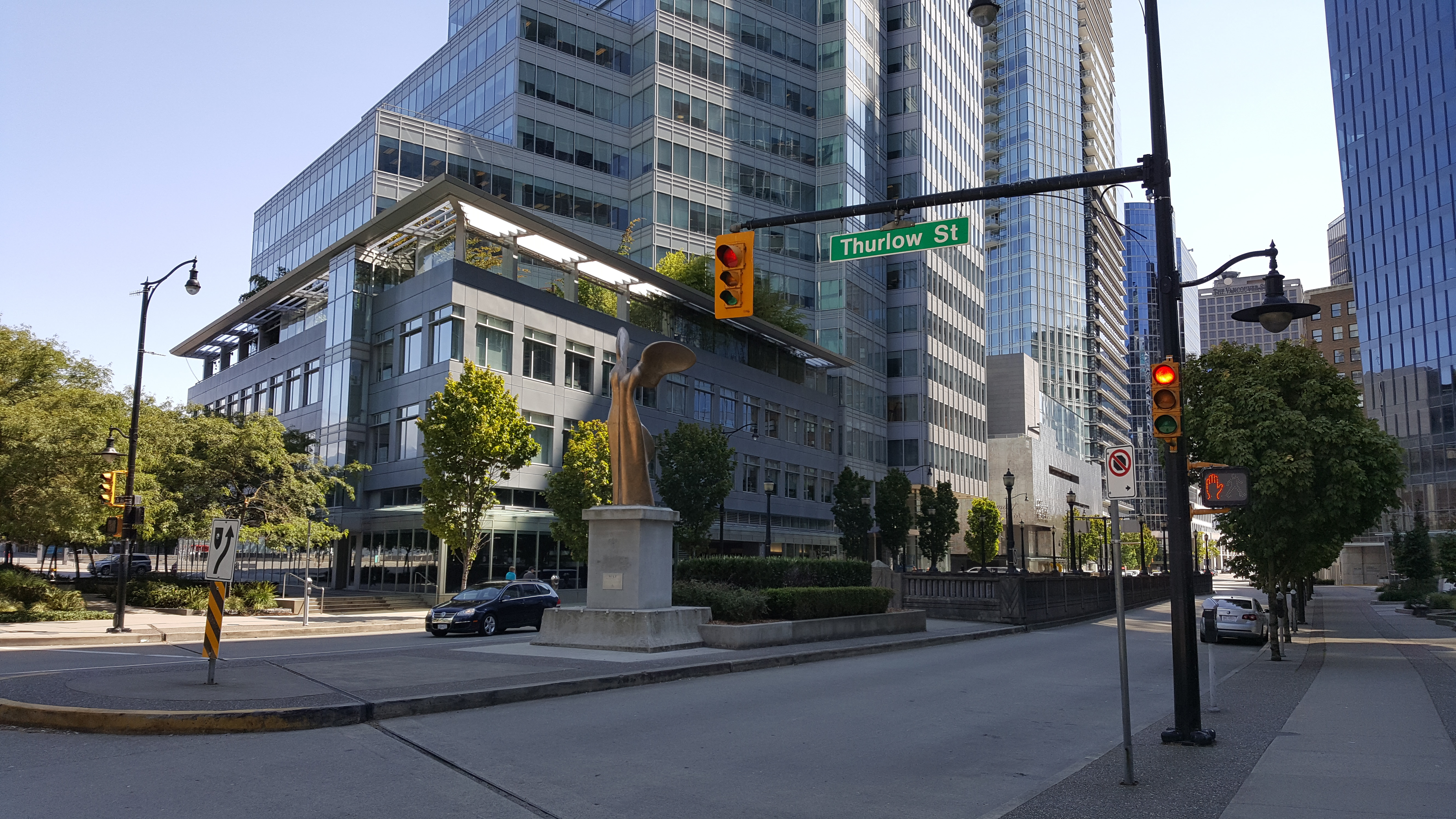 Nike statue